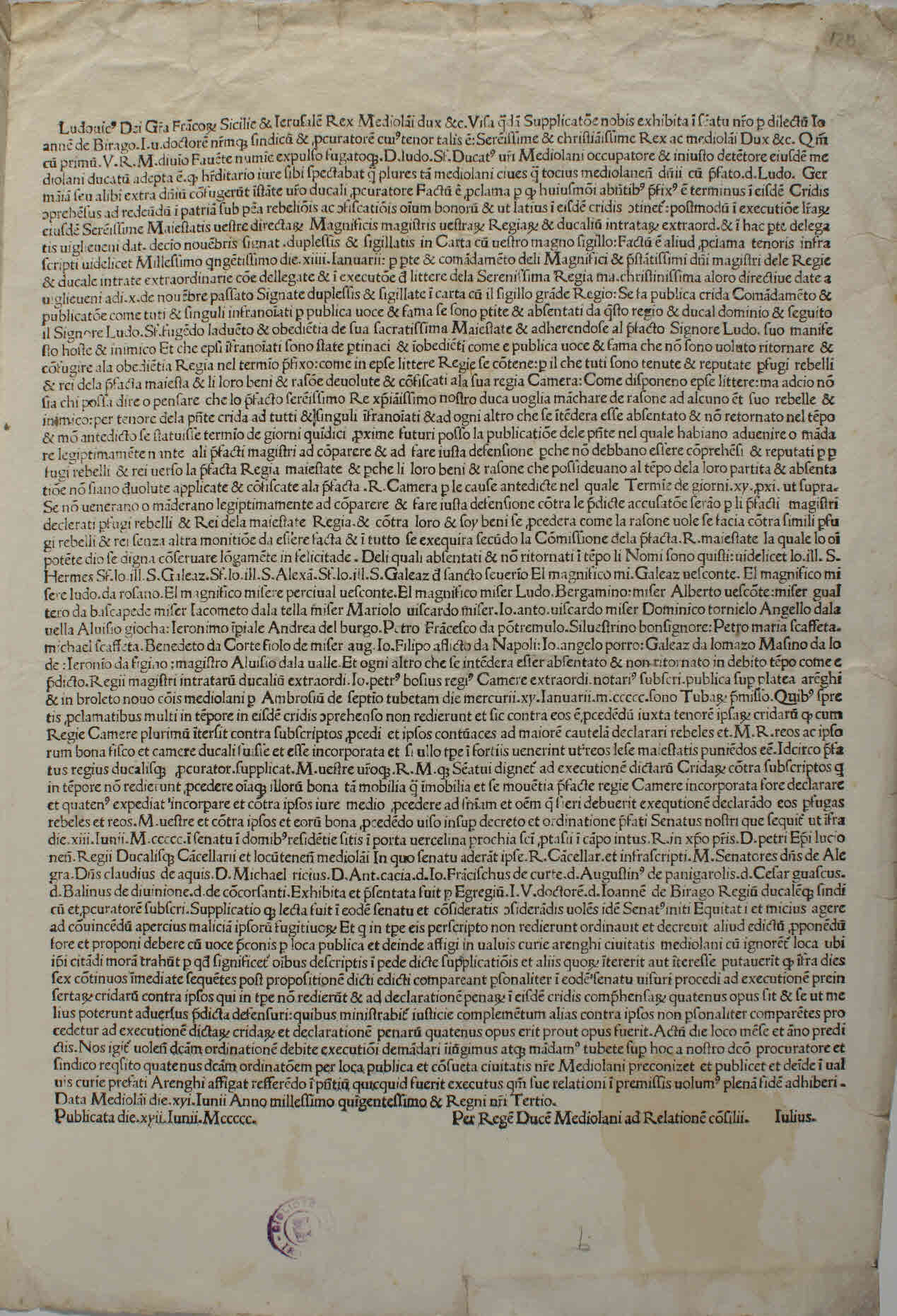 Frontespizio